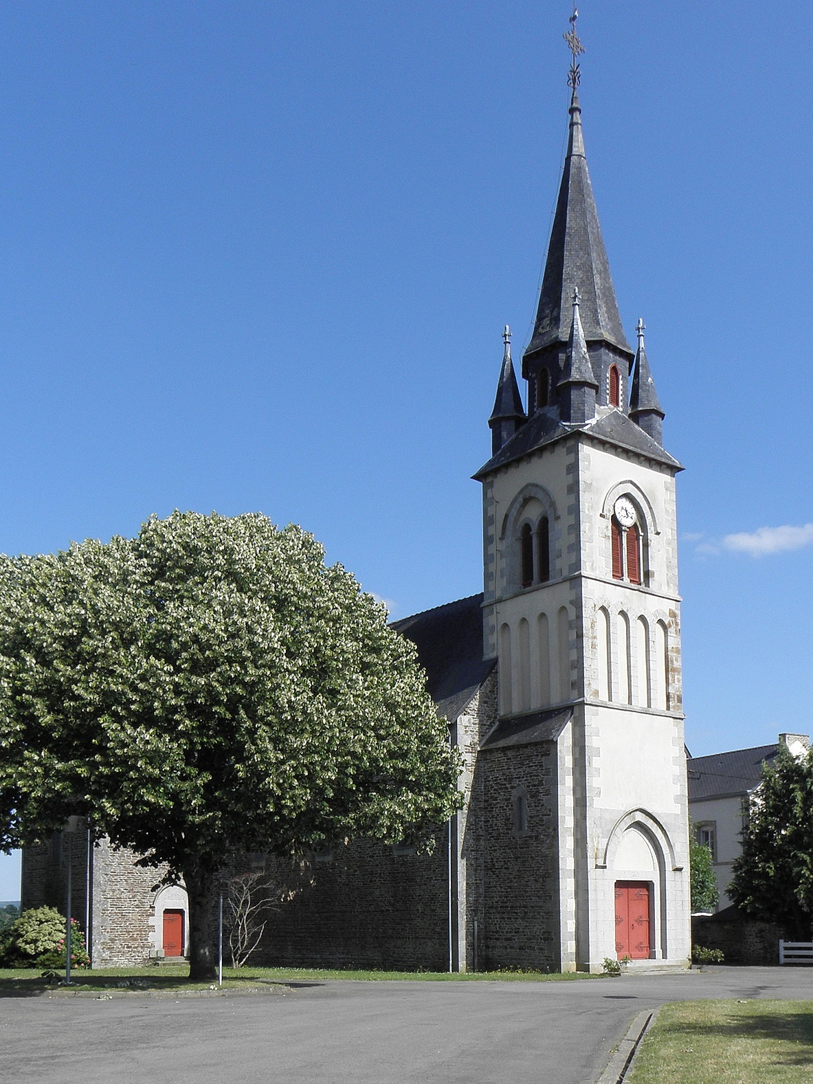 Église Saint-Pierre de La Haie-Traversaine (53).